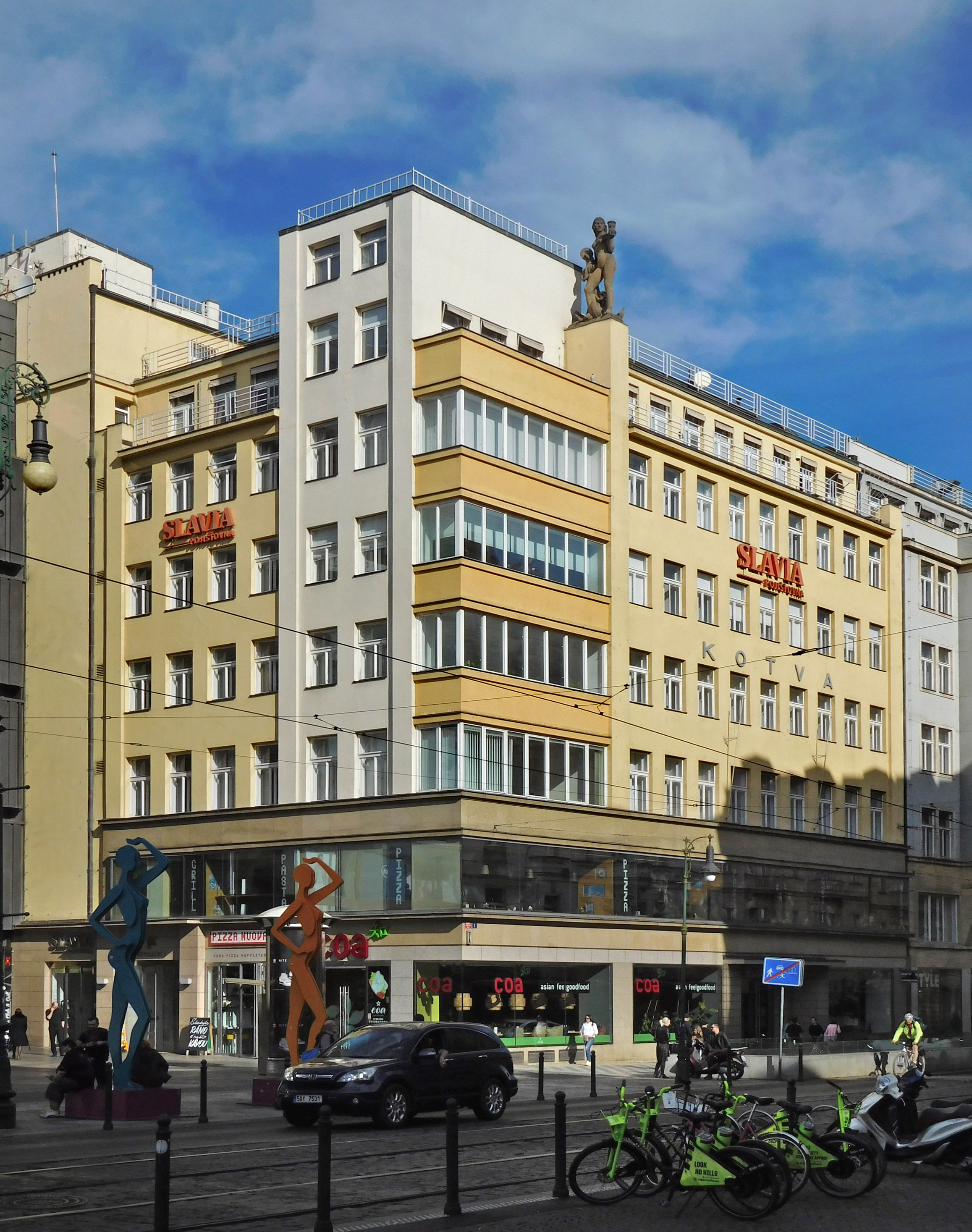 Praha - Staré Město, Revoluční 1, Palác Kotva